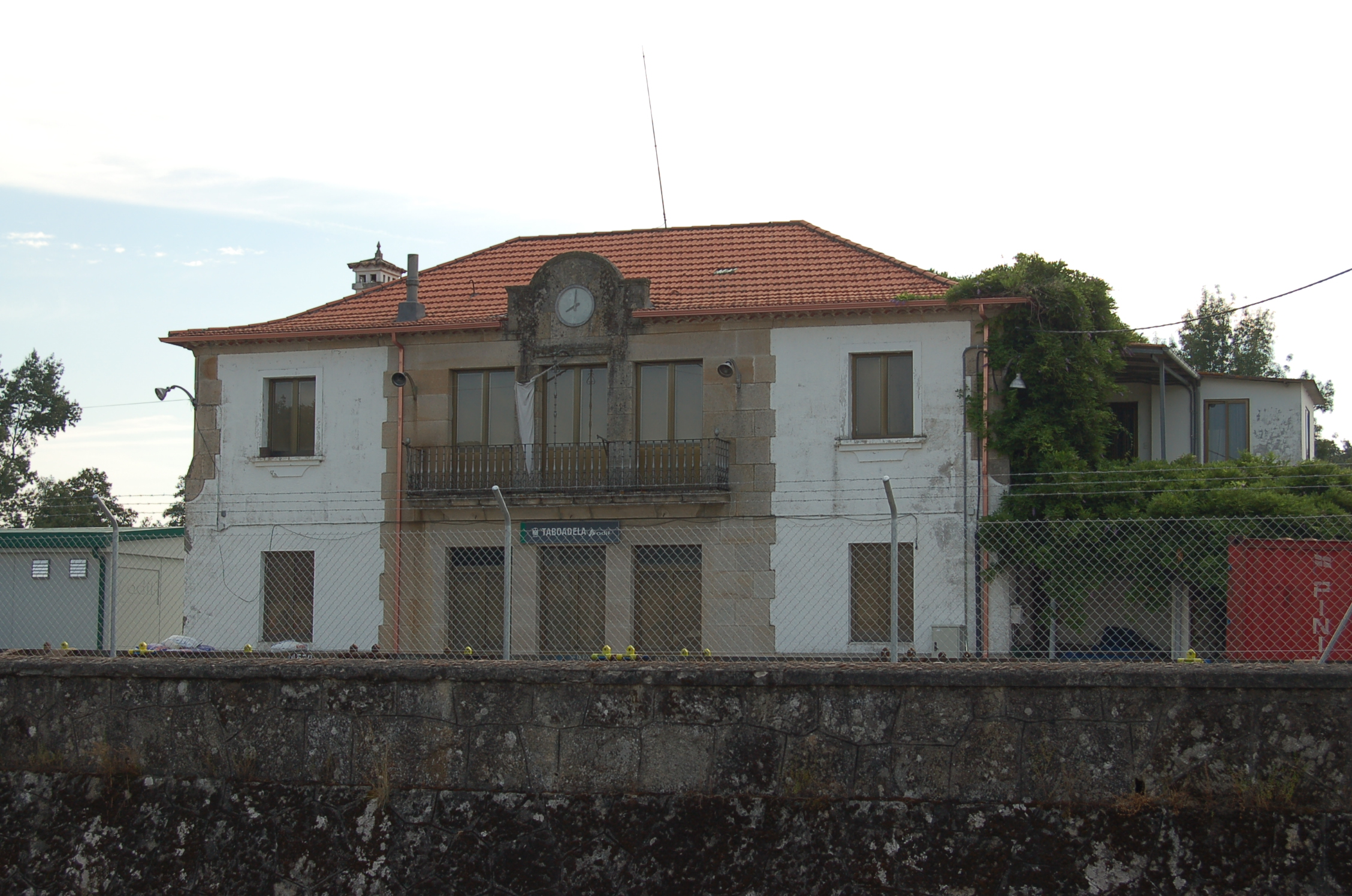 Estación de ferrocarril de Taboadela, en Veredo, O Mesón de Calvos